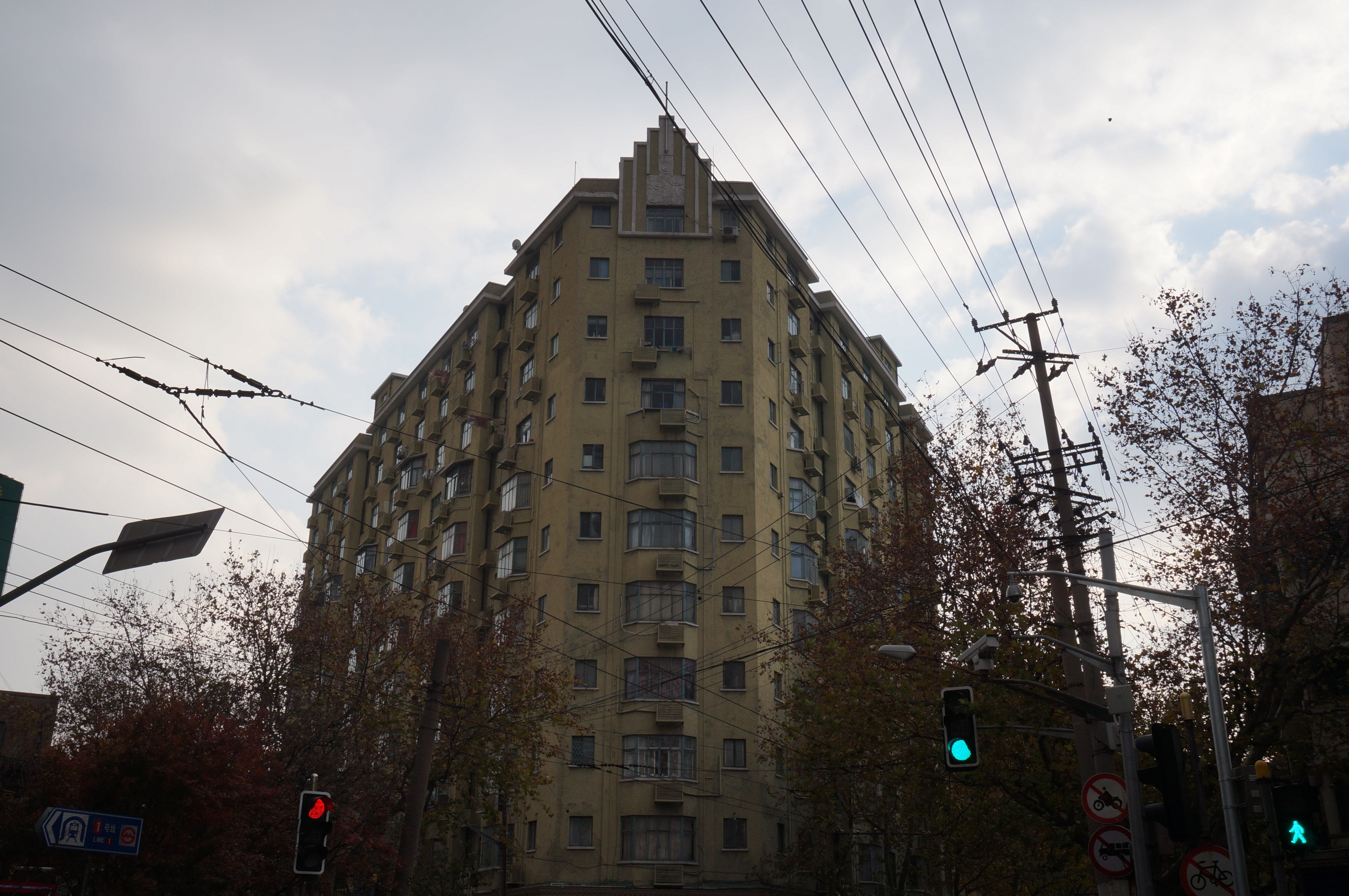 华盛顿公寓（西湖公寓）